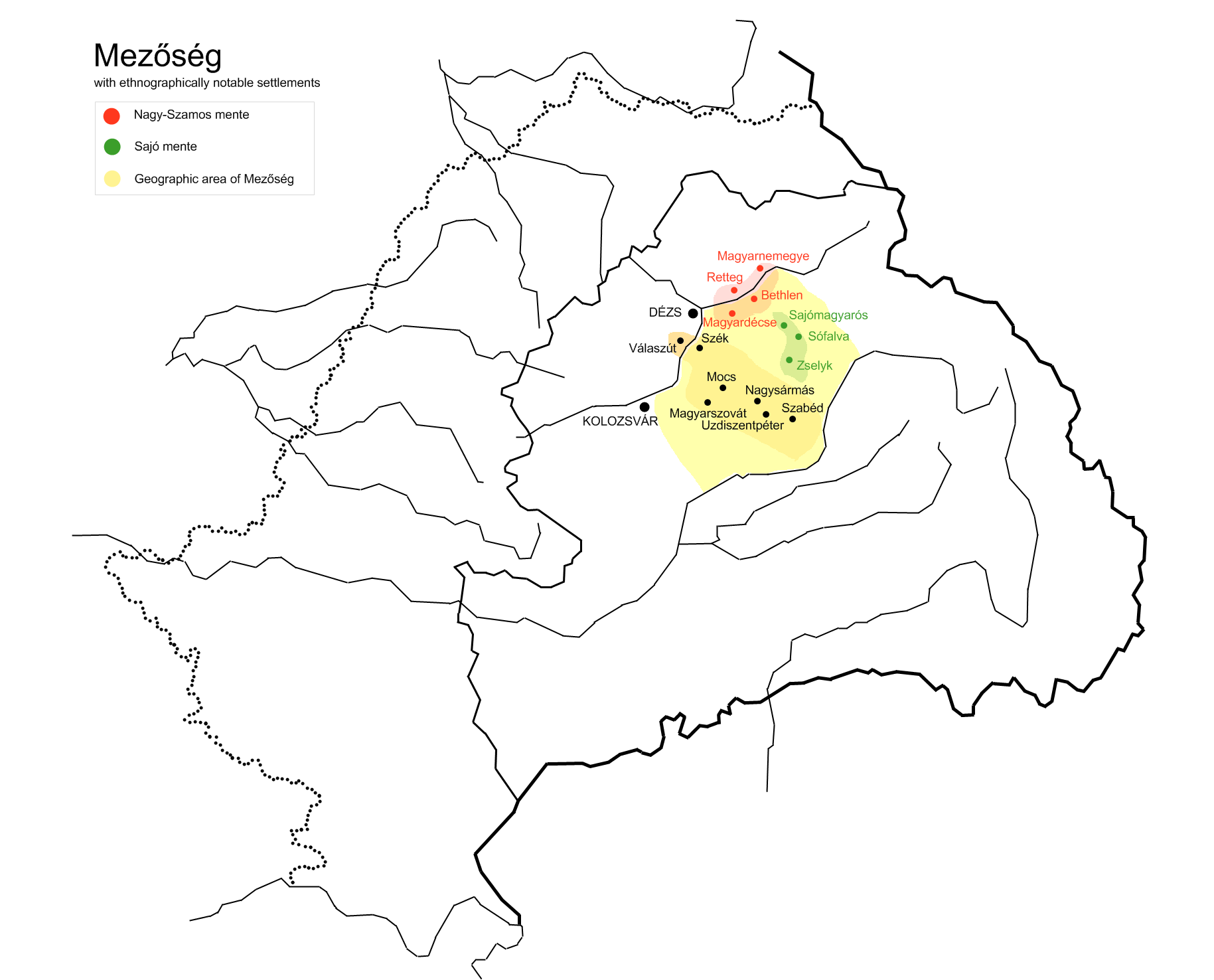 Transylvanian Plain